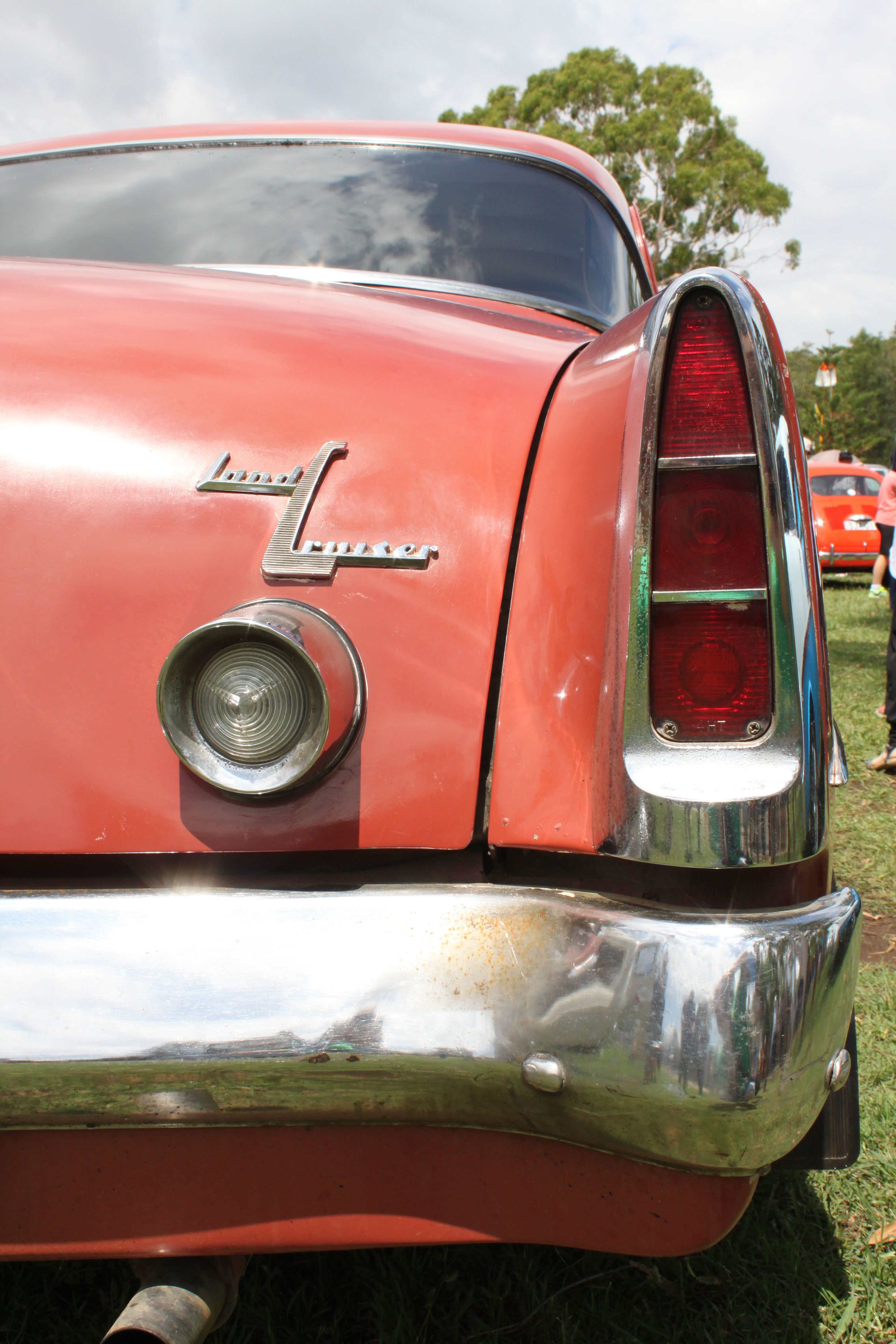 CARnivale, Parramatta Park, NSW Australia Day 2016